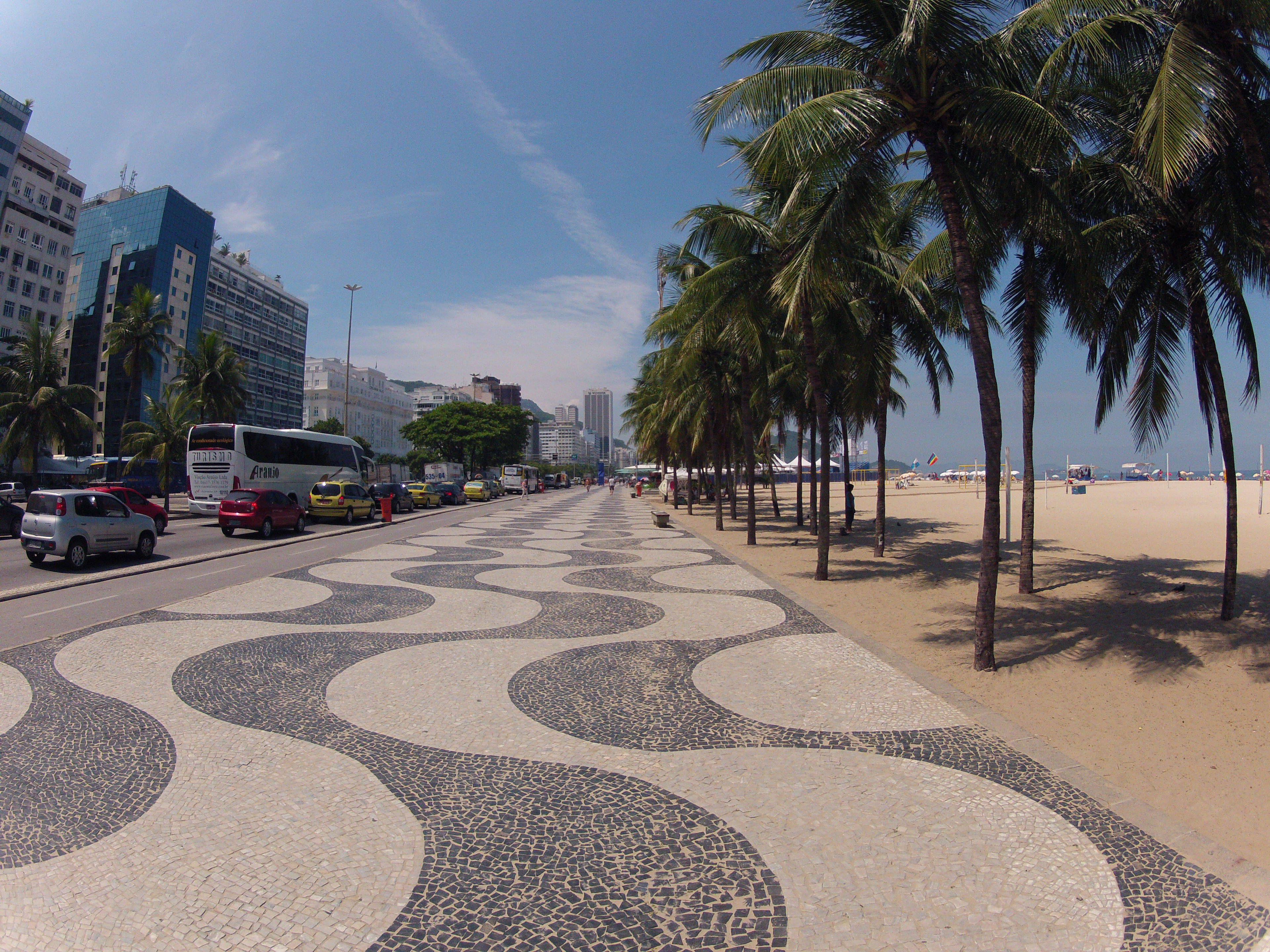 Calçadão da praia de Copacabana - Rio de Janeiro. Próximo a Rua República do Peru